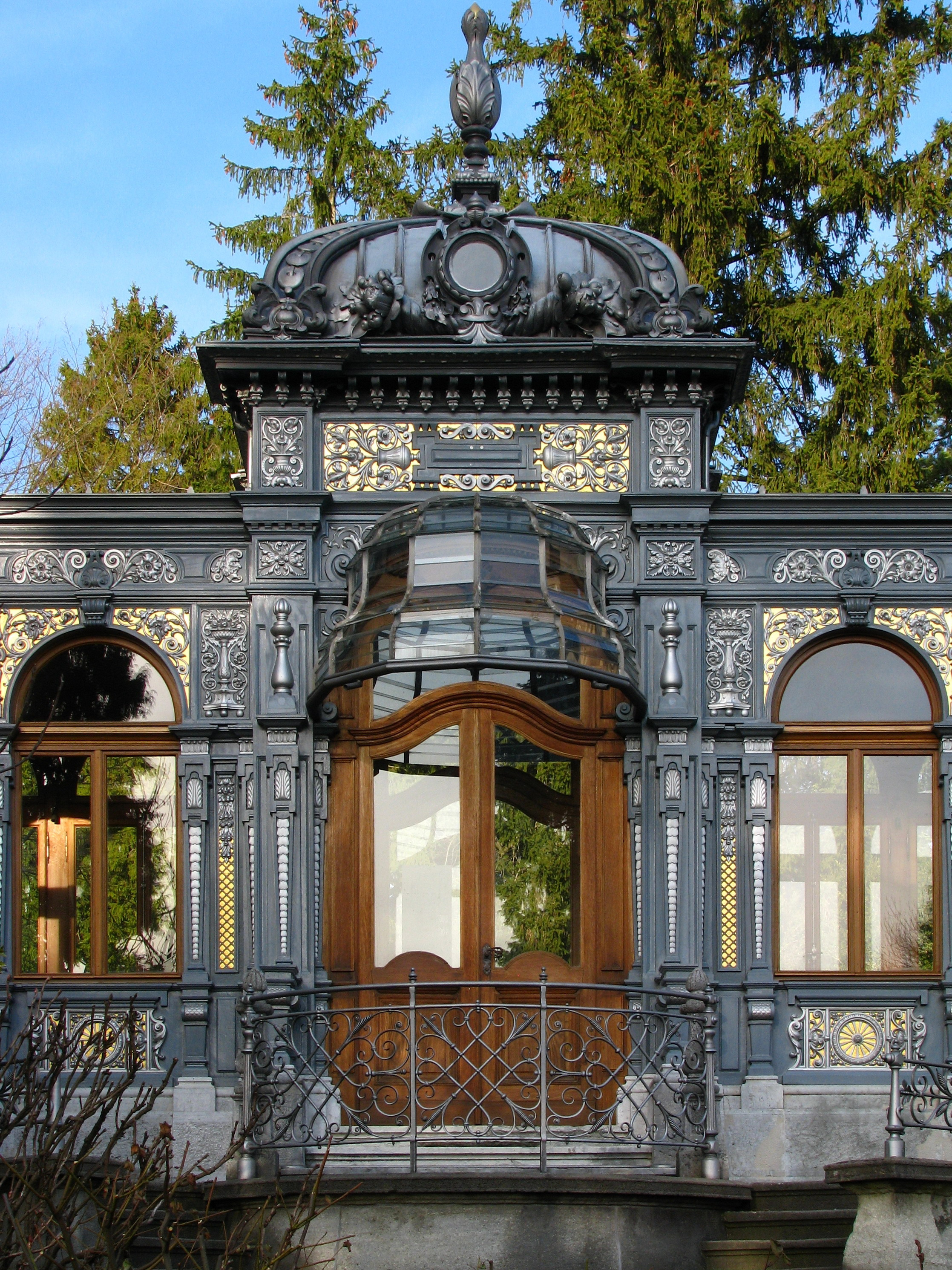 Villa Patumbah in Zürich-Mühlebach (Switzerland)